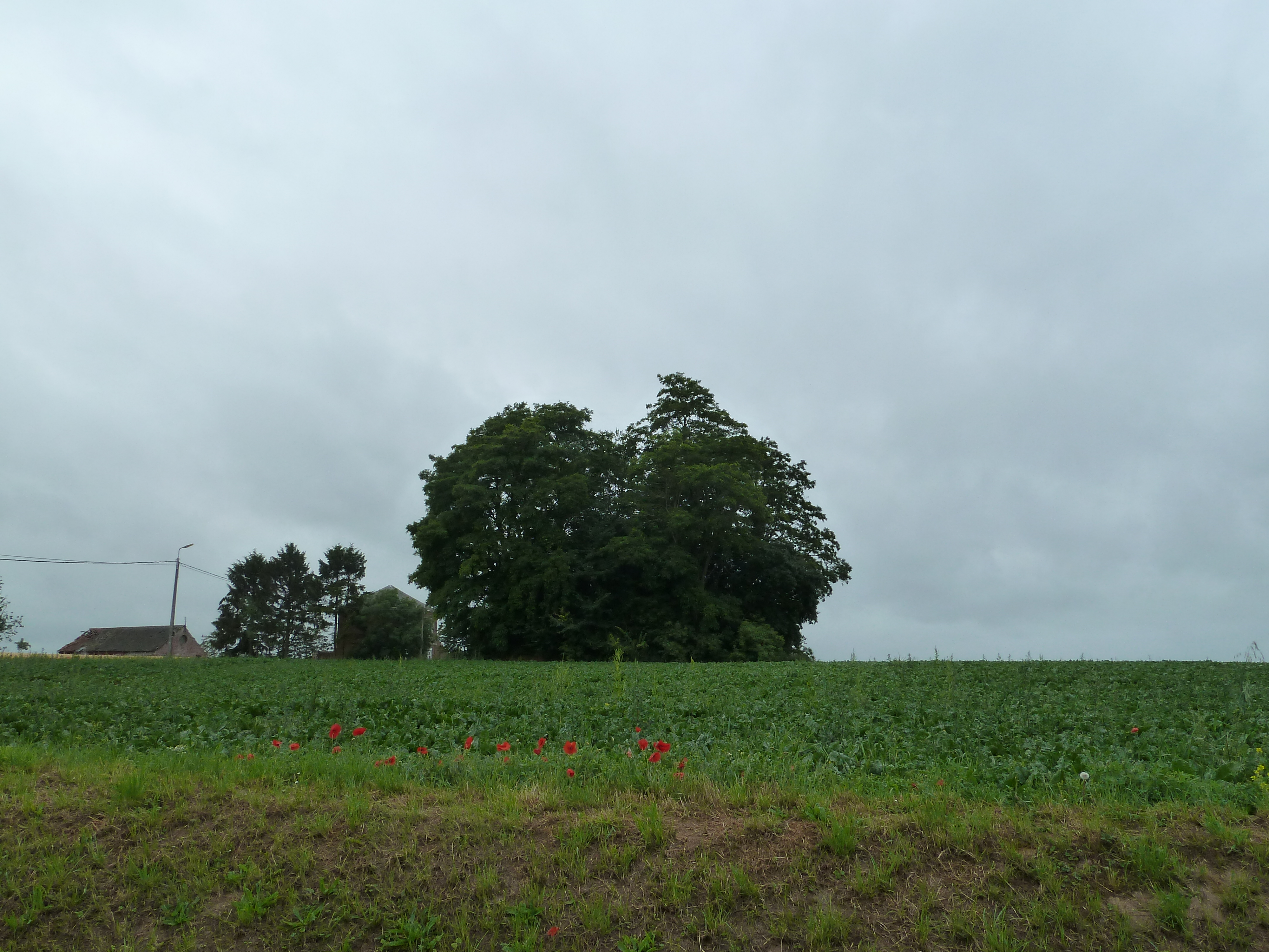 Tumulus de Vissoul, Burdinne, Belgique